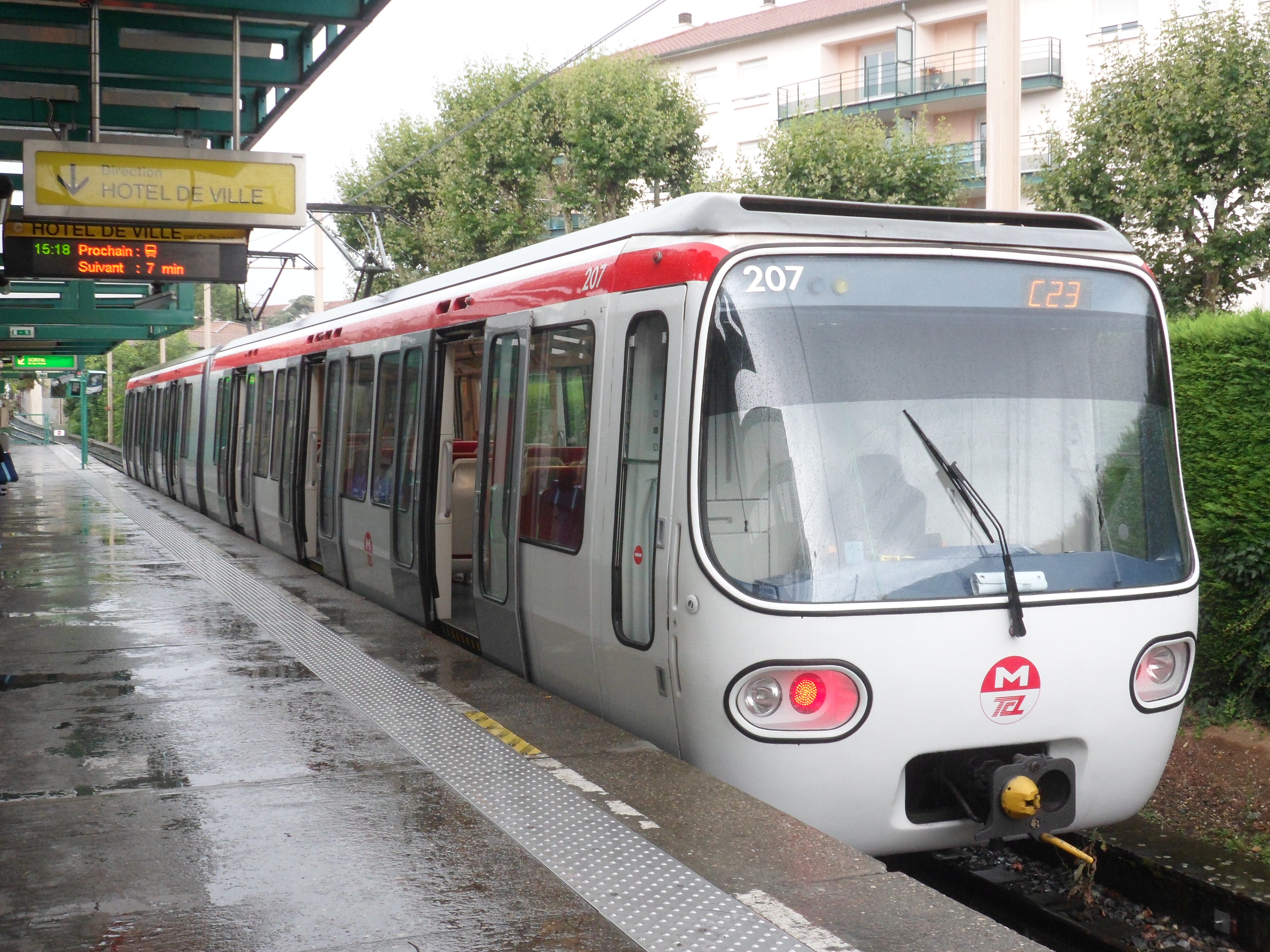 Un MCL80 de la ligne C lyonnaise, à son terminus Cuire.